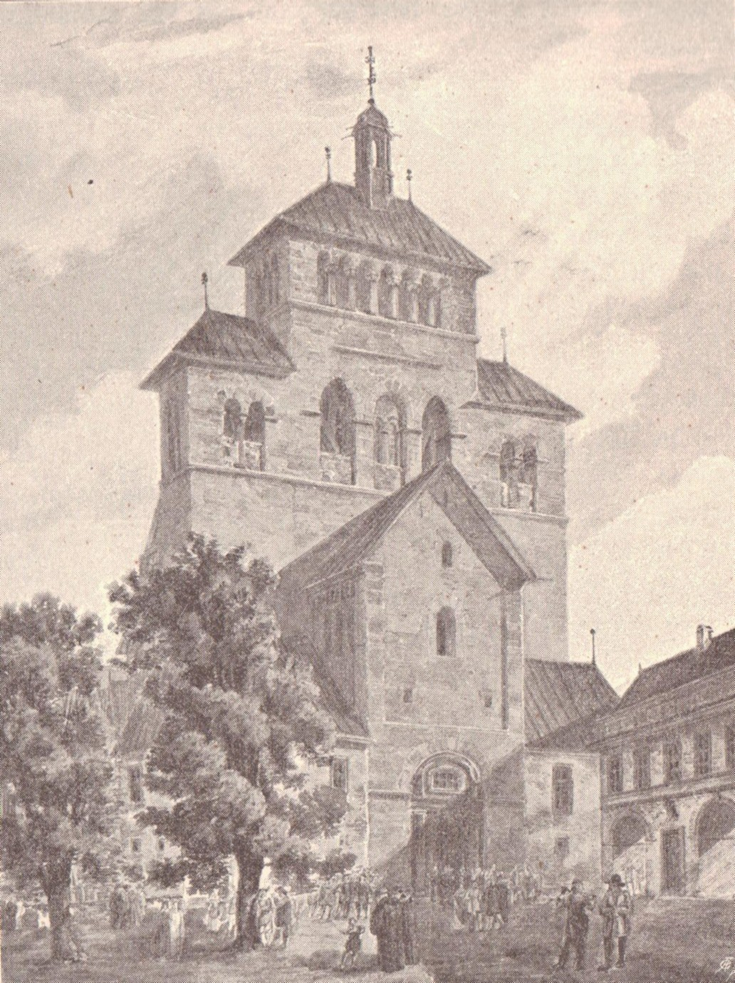 Hildesheim, Dom, mit dem 1840/41 abgebrochenen Westwerk; rechts der Verbindungsgang zur fürstbischöflichen Residenz